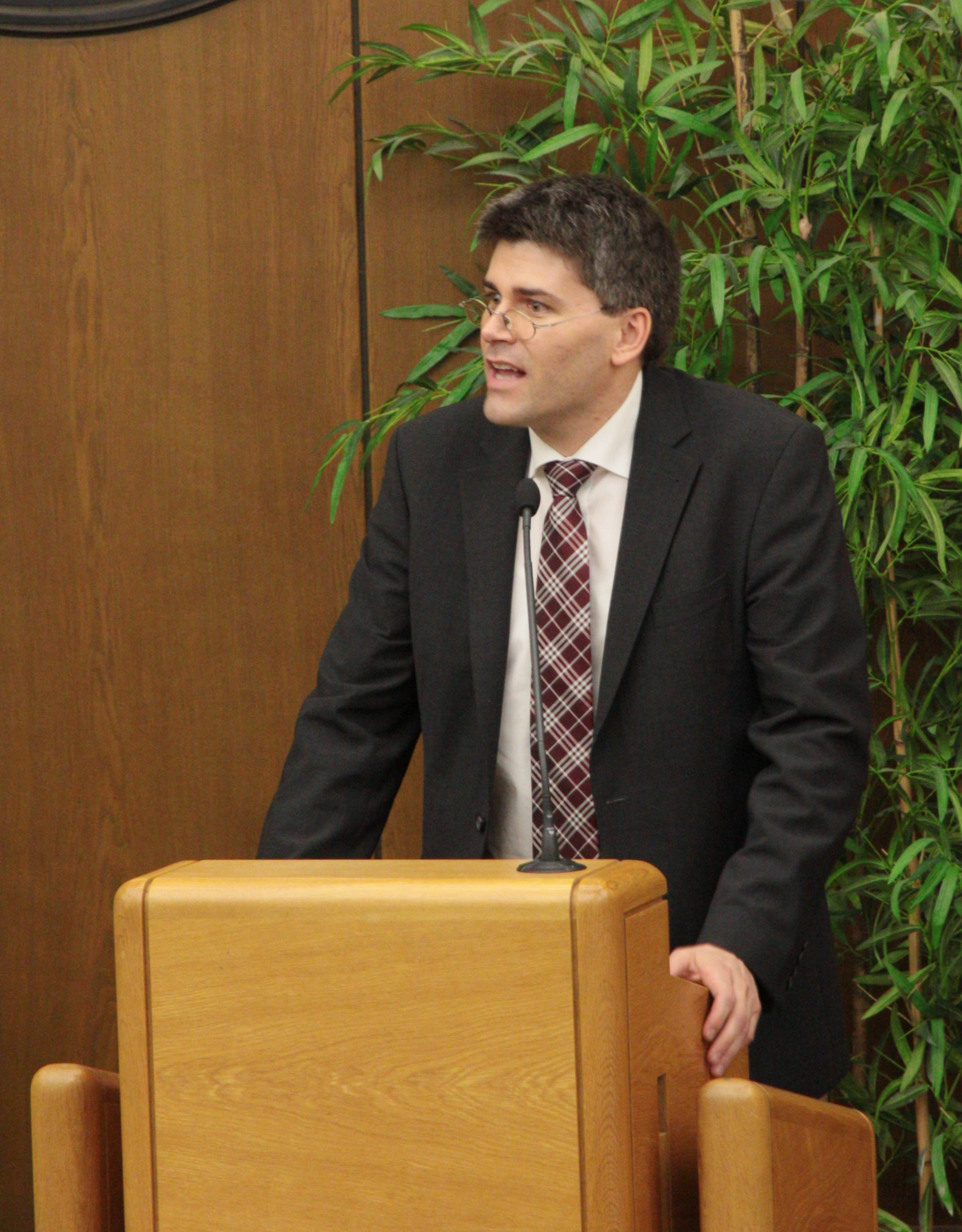 Martin Kistler - neuer Landrat von Waldshut